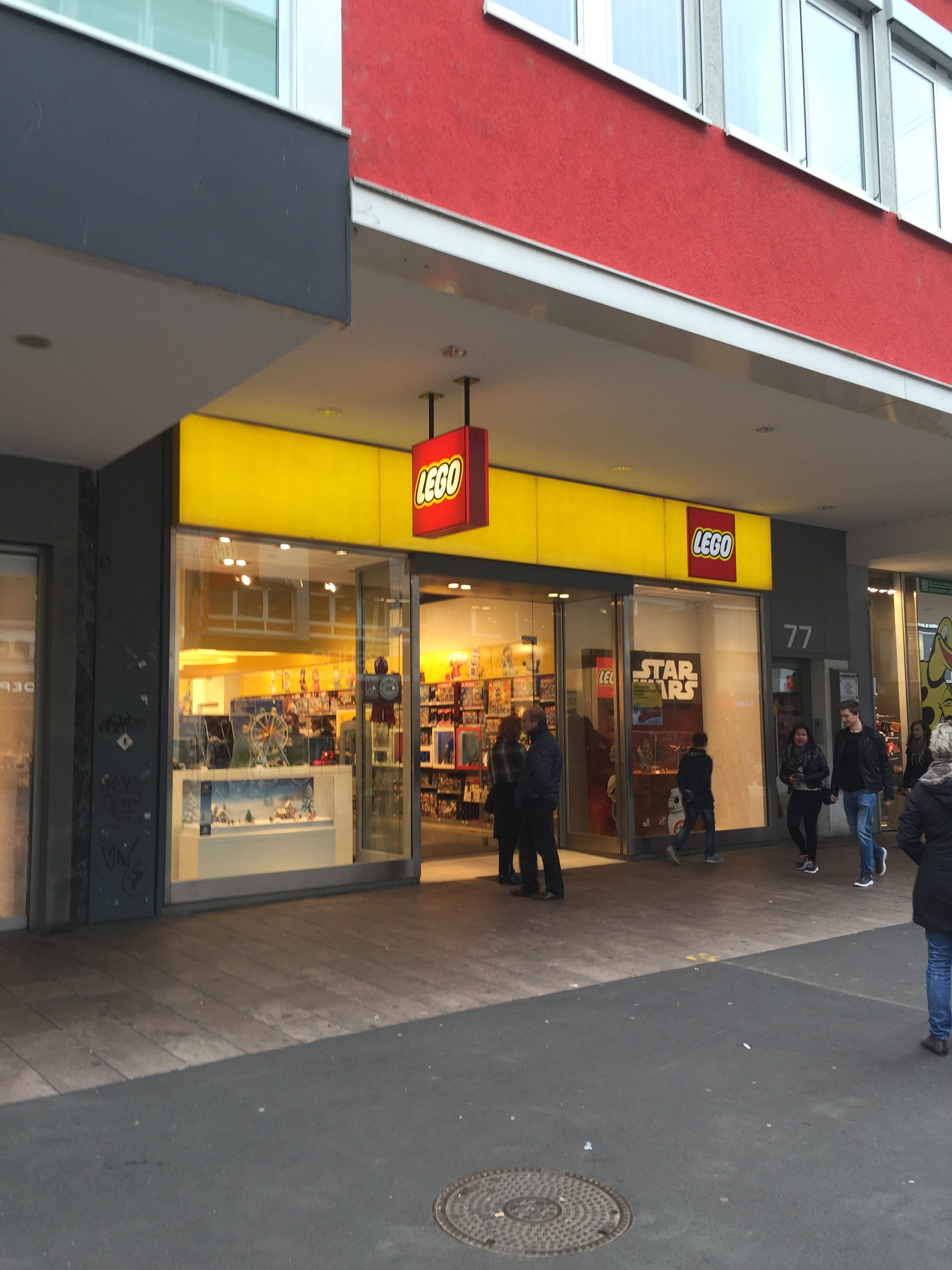 Lego Shop